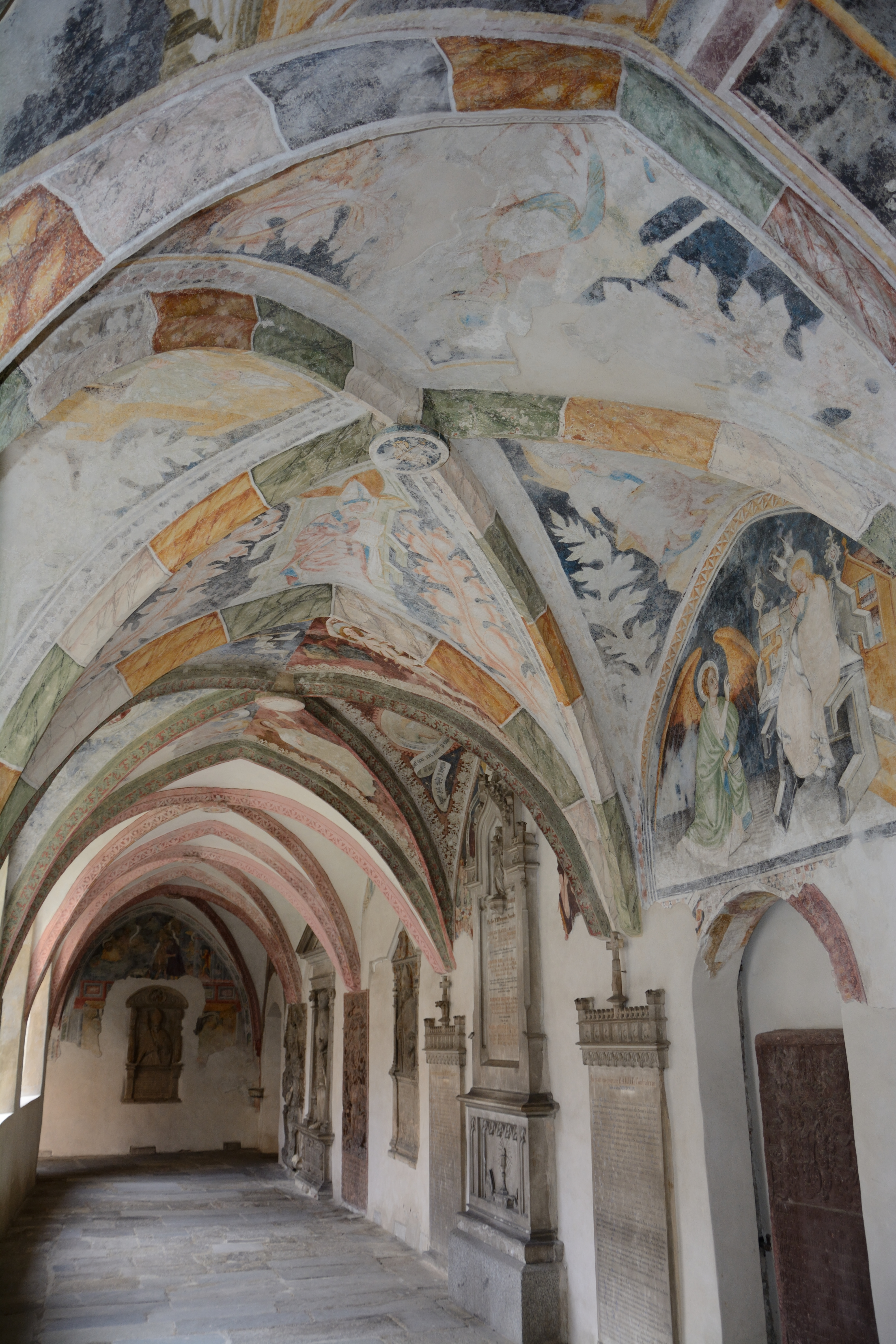 Kreuzgang des Klosters Neustift bei Brixen mit spätgotischen Fresken von Michael Pacher